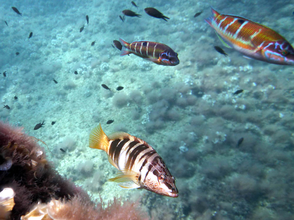 Serranus scriba, Thalassoma pavo y Chromis chromis en aguas de El Portús (Cartagena, España)